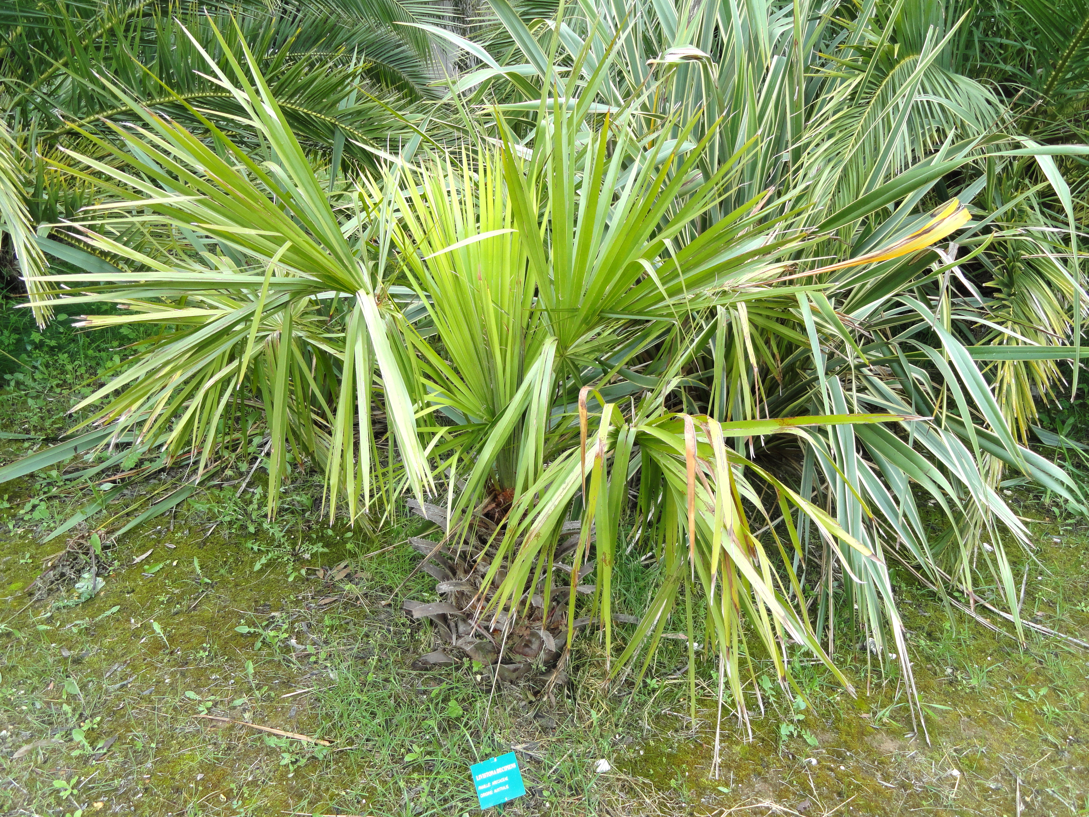 Livistona decipiens specimen in the Jardin d'oiseaux tropicaux, La Londe-les-Maures, France.